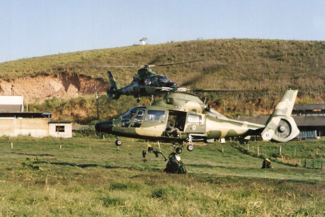 Operação aeromóvel da 2ª Bateria de Obuses do 20º Grupo de Artilharia de Campanha Leve, região de Jambeiro, SP.